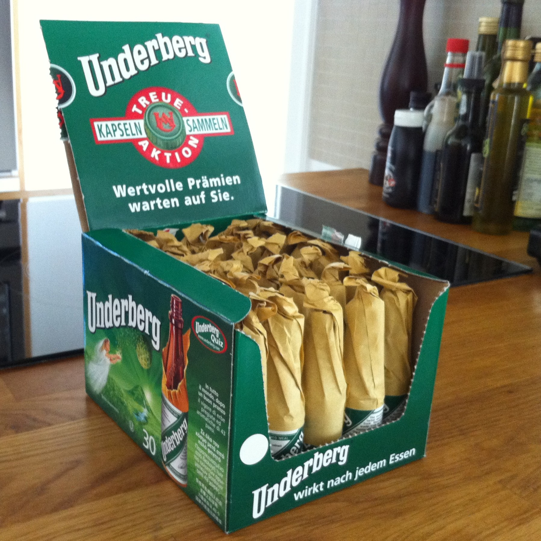 Underberg